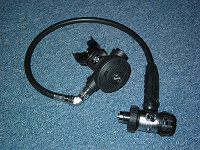 Scuba regulator